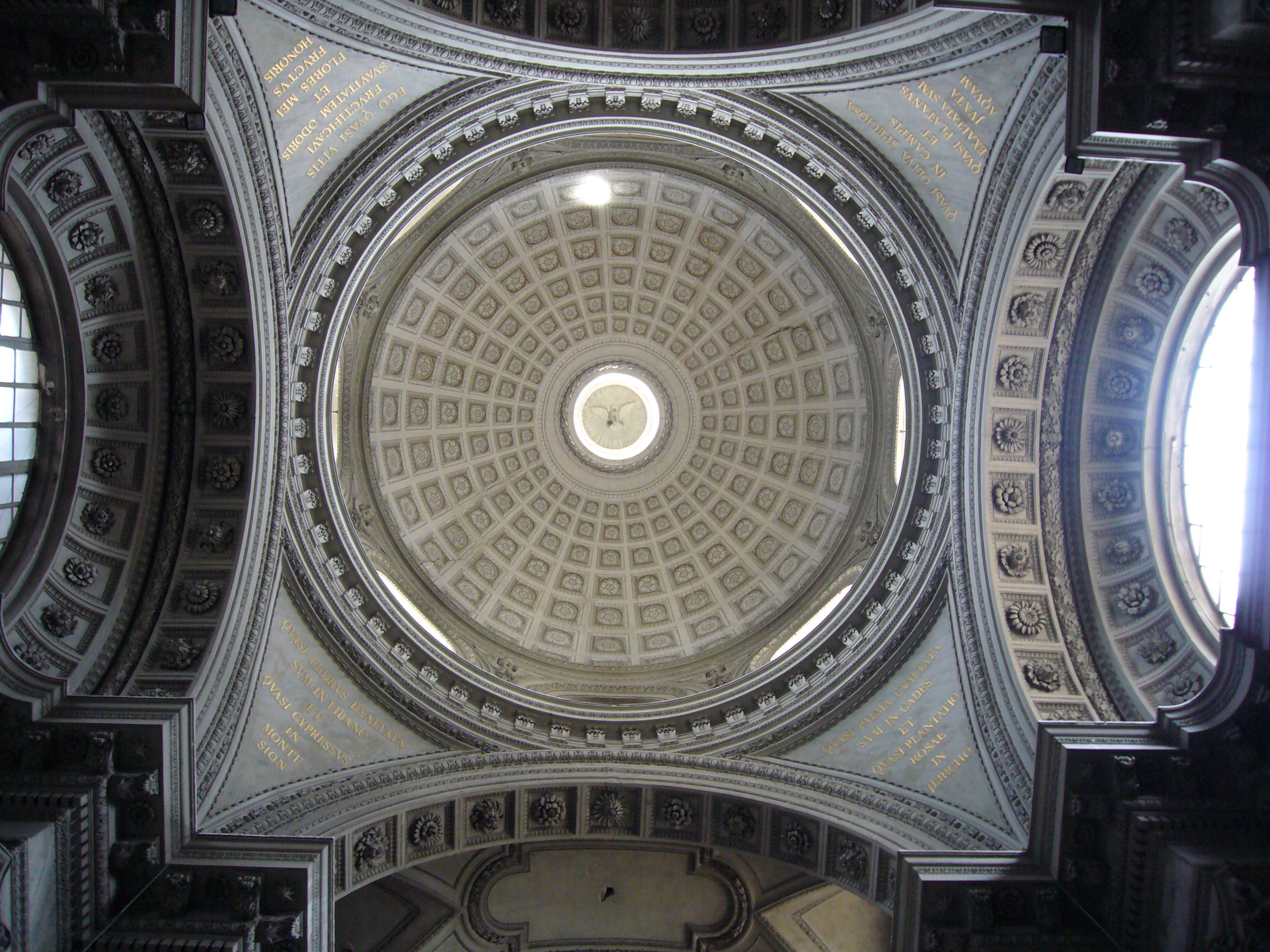 Roma, Santa Maria in Portico: interno della cupola